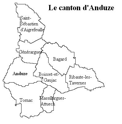 Le canton d'Anduze Image personnelle